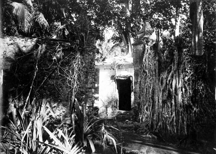 Repronegatief. Kruithuisje van fort "Kalamatta" op Ternate